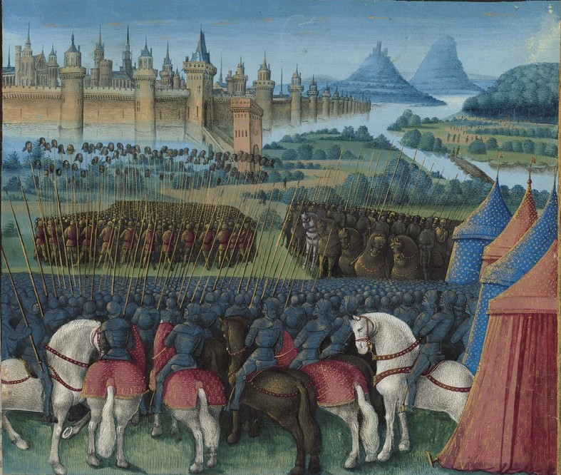 « Passages faiz oultre mer (...)SEBASTIEN MAMEROT 52